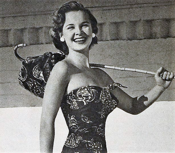 Mona Freeman